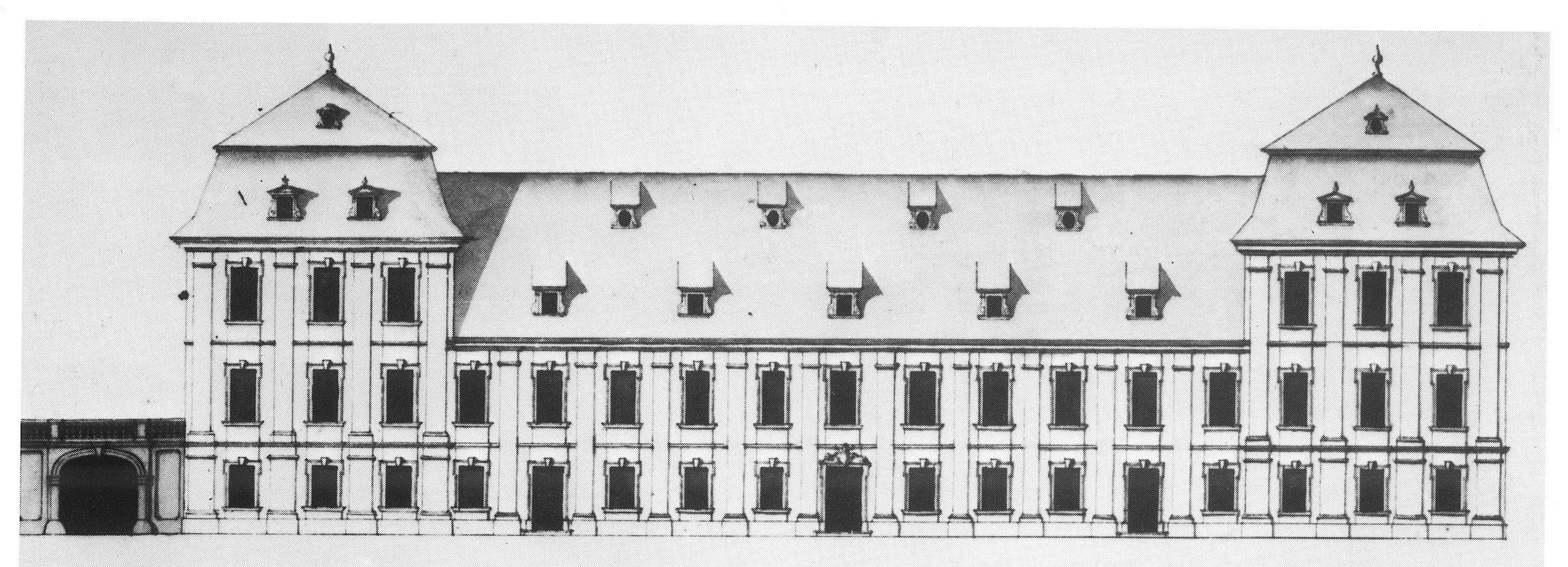 Münsterschwarzach, 17achsiger Bau mit zwei Eckpavillons. Gedeutet als Entwurf der Klostermühle